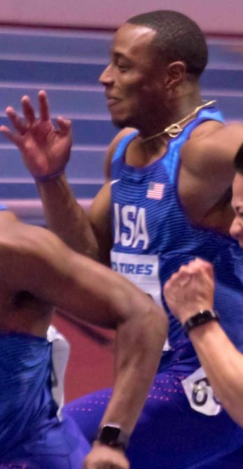 WK3B0325 finale 60m coleman